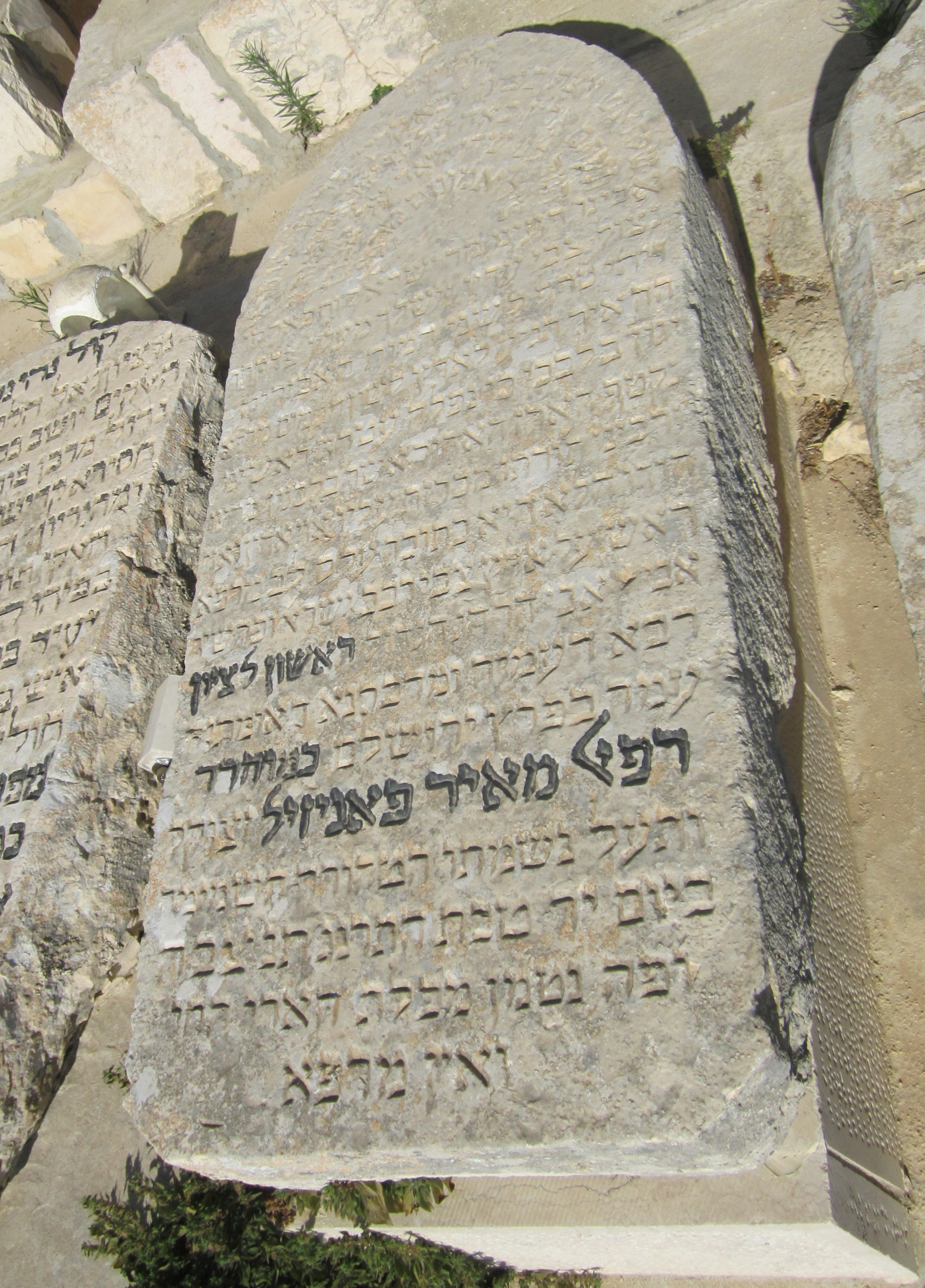 קבר הרב רפאל מאיר פאניז'ל, הראשון לציון, בהר הזיתים